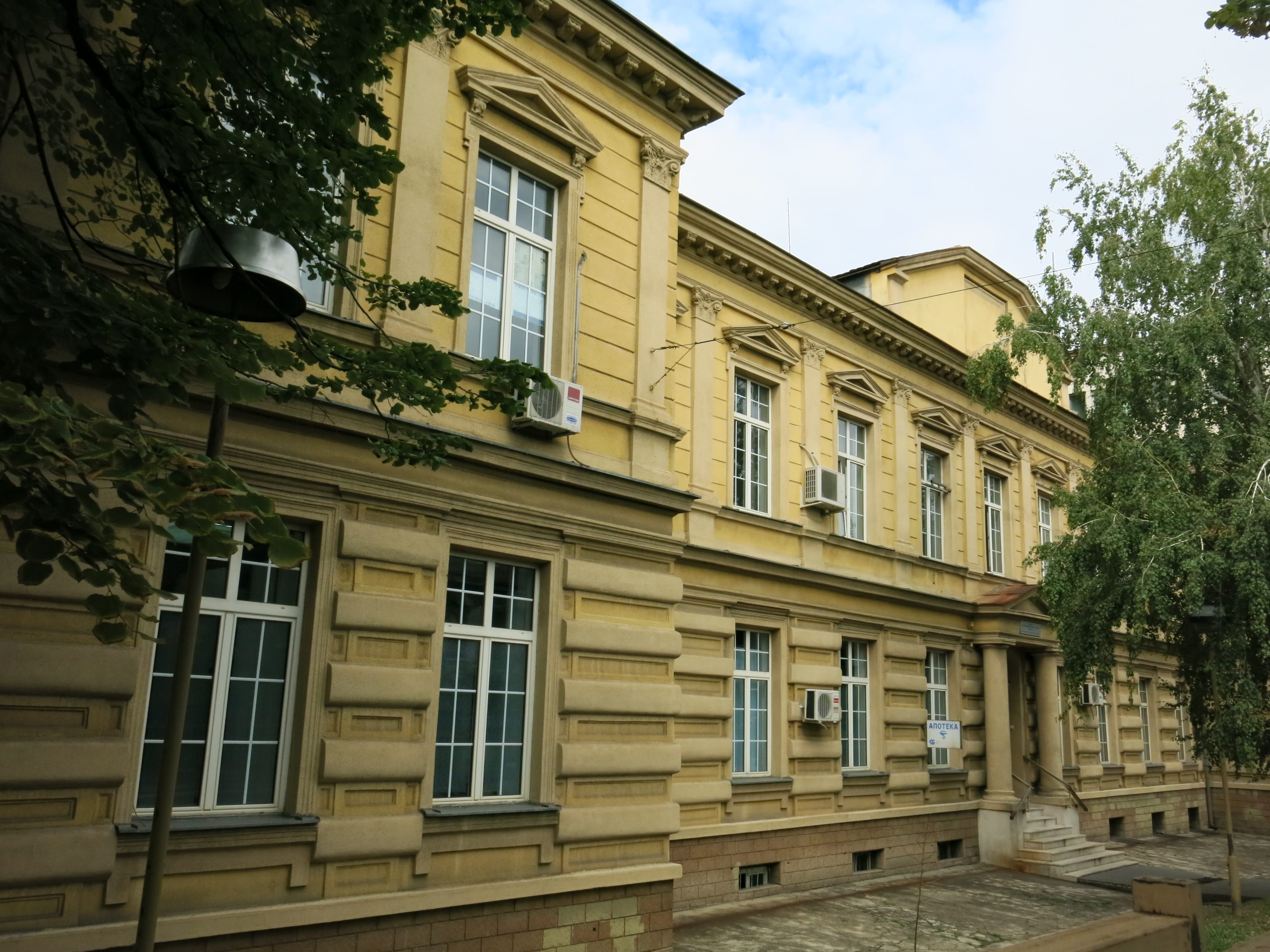 Дом сироте деце